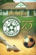 Tótszentmárton Műszer Automatika-FC Napred futballcsapat címer